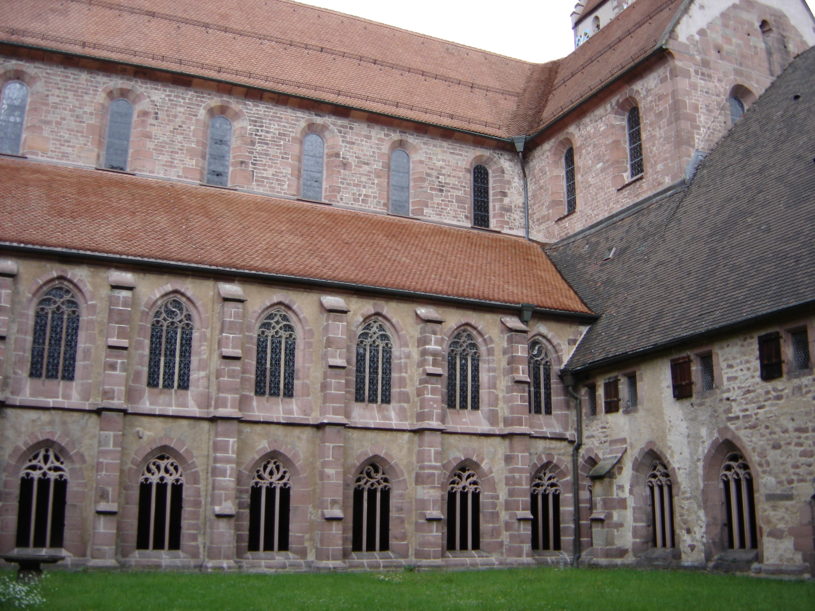 Innenhof des ehemaligen Klosters Alpirsbach